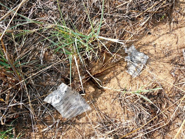 Bolsitas de veneno roídas, esparcidas por el campo. La de plástico es Bromadiolona, la de papel es Clorofacinona, ambos utilizados para combatir la plaga de topillos (Microtus arvalis astorianus) en Castilla y León, 2007